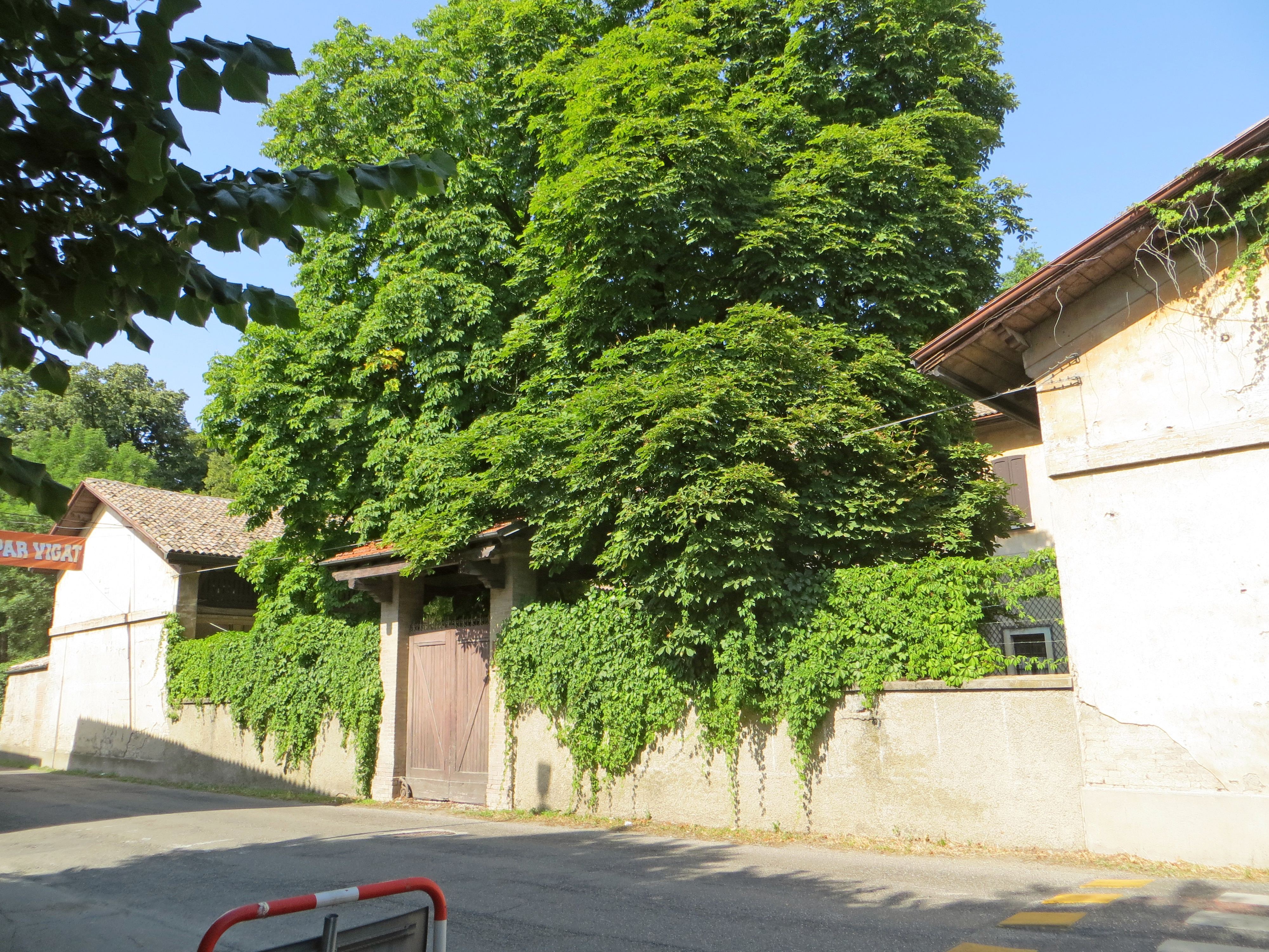 Villa Meli Lupi (Vigatto, Parma) - facciata del Palazzo